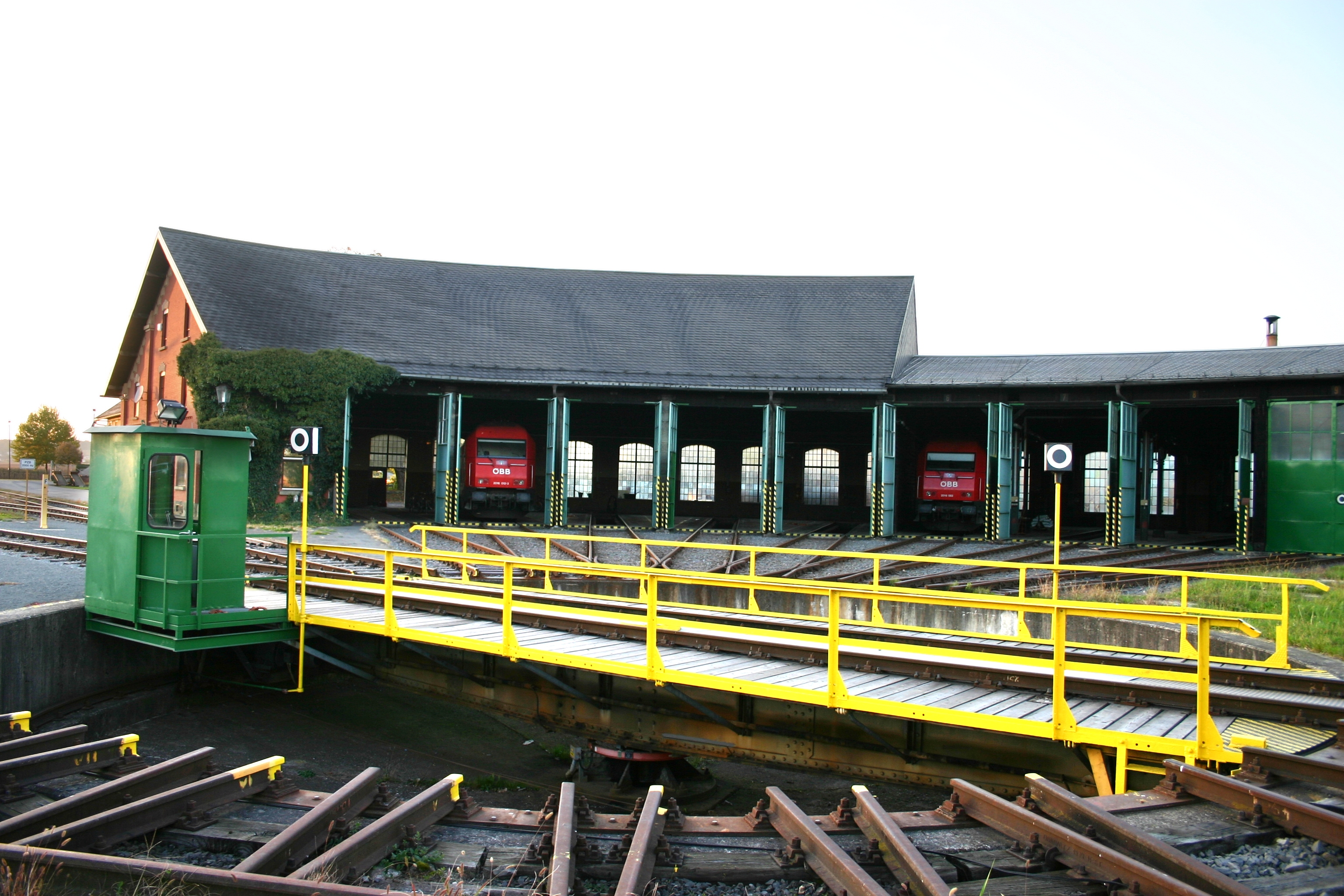 Fehring – Bahnhof der Steirischen Ostbahn und Abzweigbahnhof der Thermenbahn, Lokomotivdrehscheibe mit Rundschuppen